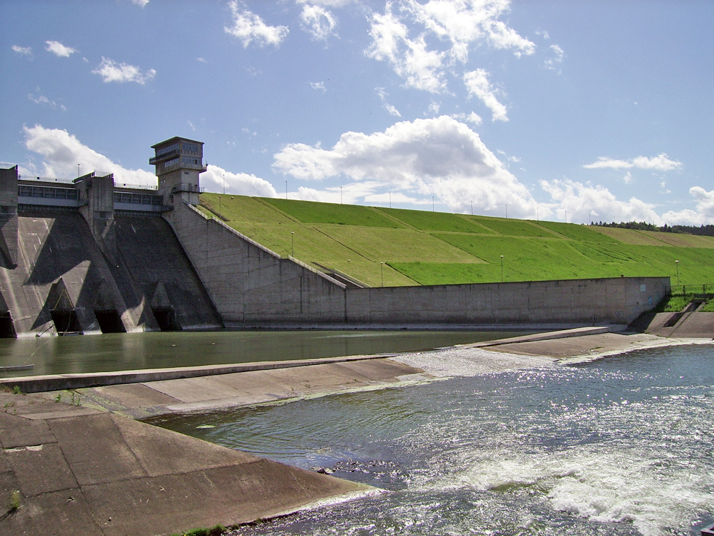 Zapora w Dobczycach.